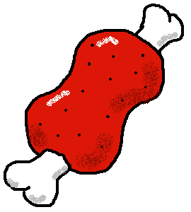 Manga_meat（マンガ肉）